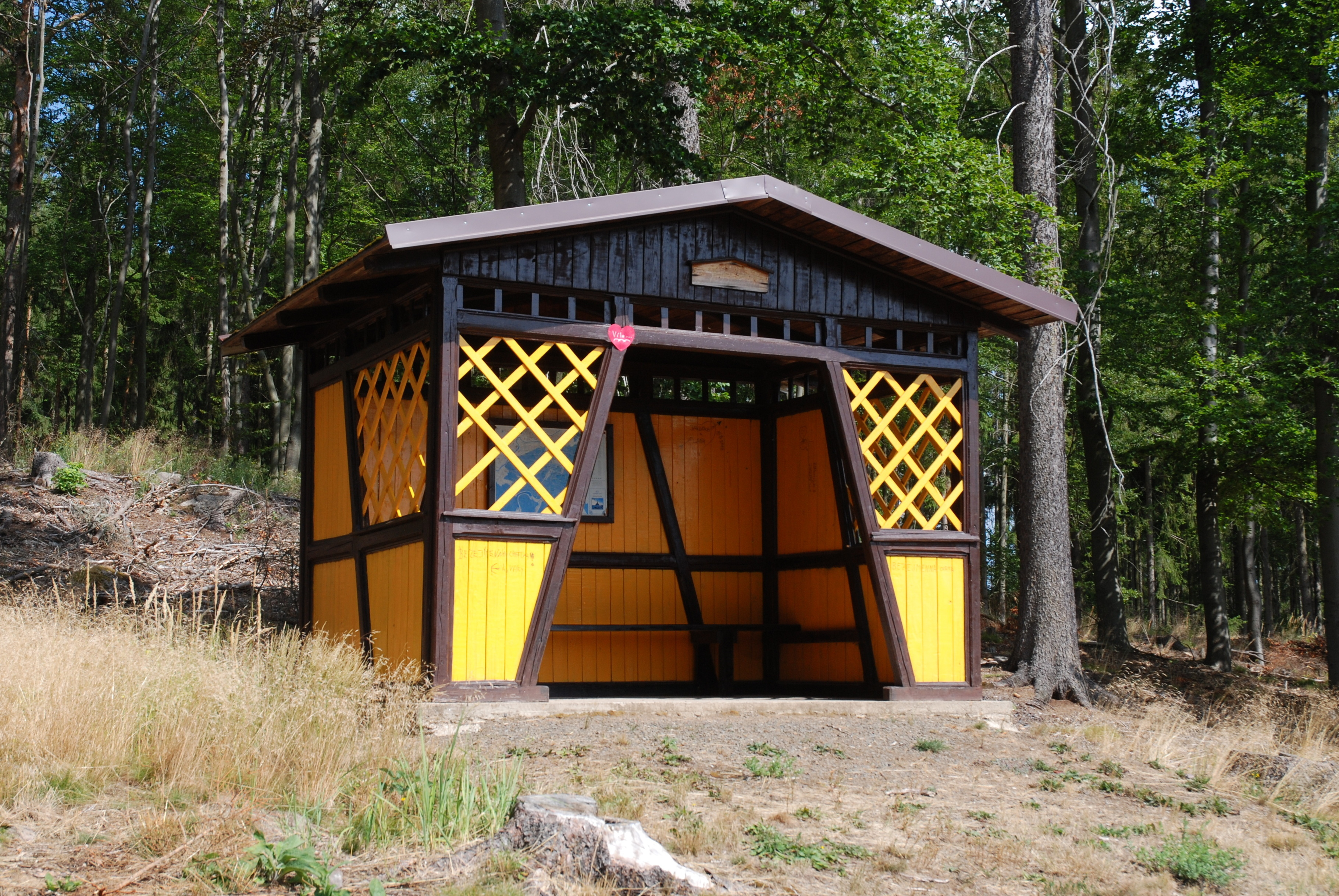 Chata Bezejmenná v karlovarských lázeňských lesích